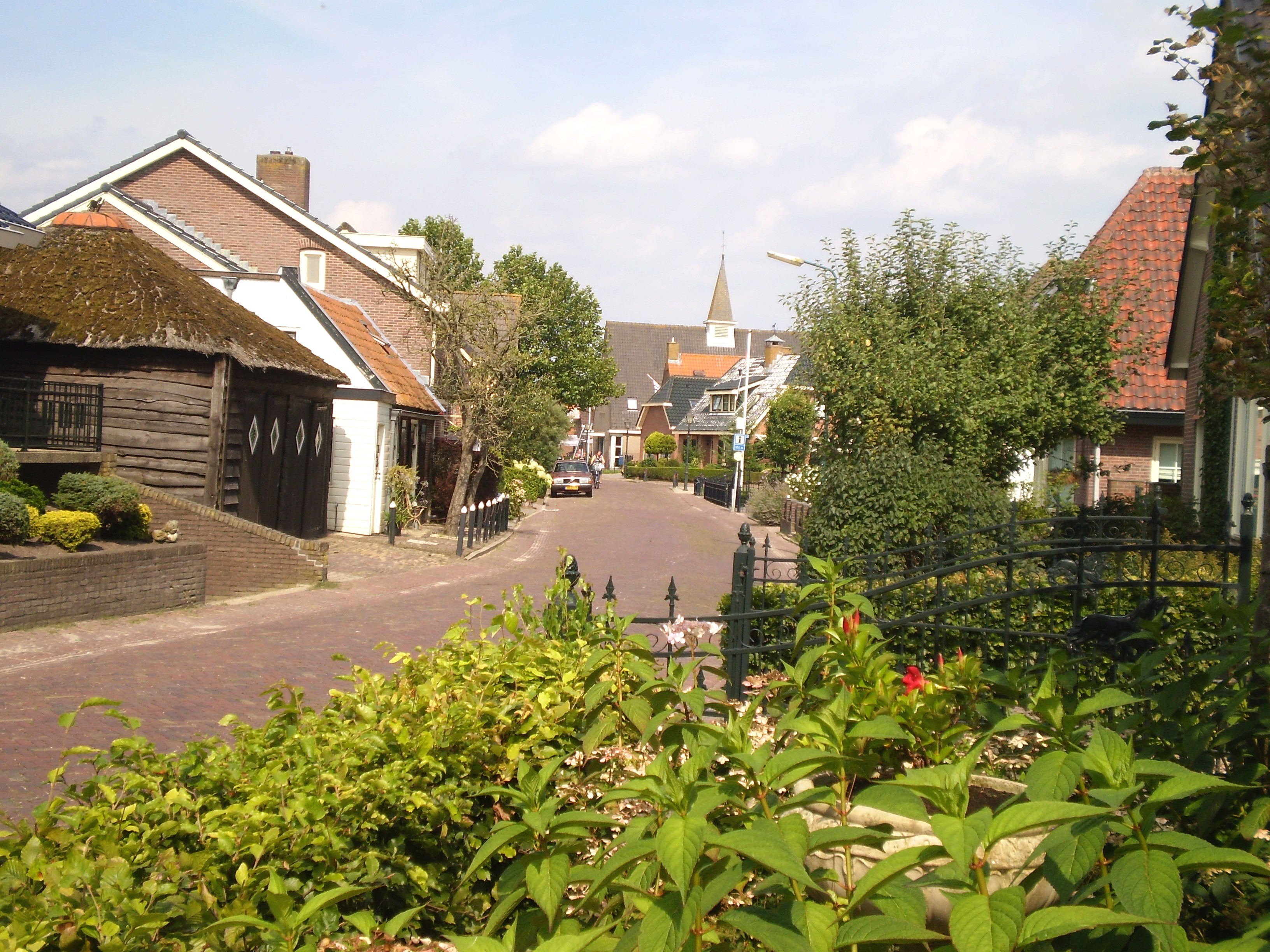 Foto oanbean troch Swarte Kees op 18 augustus 2009